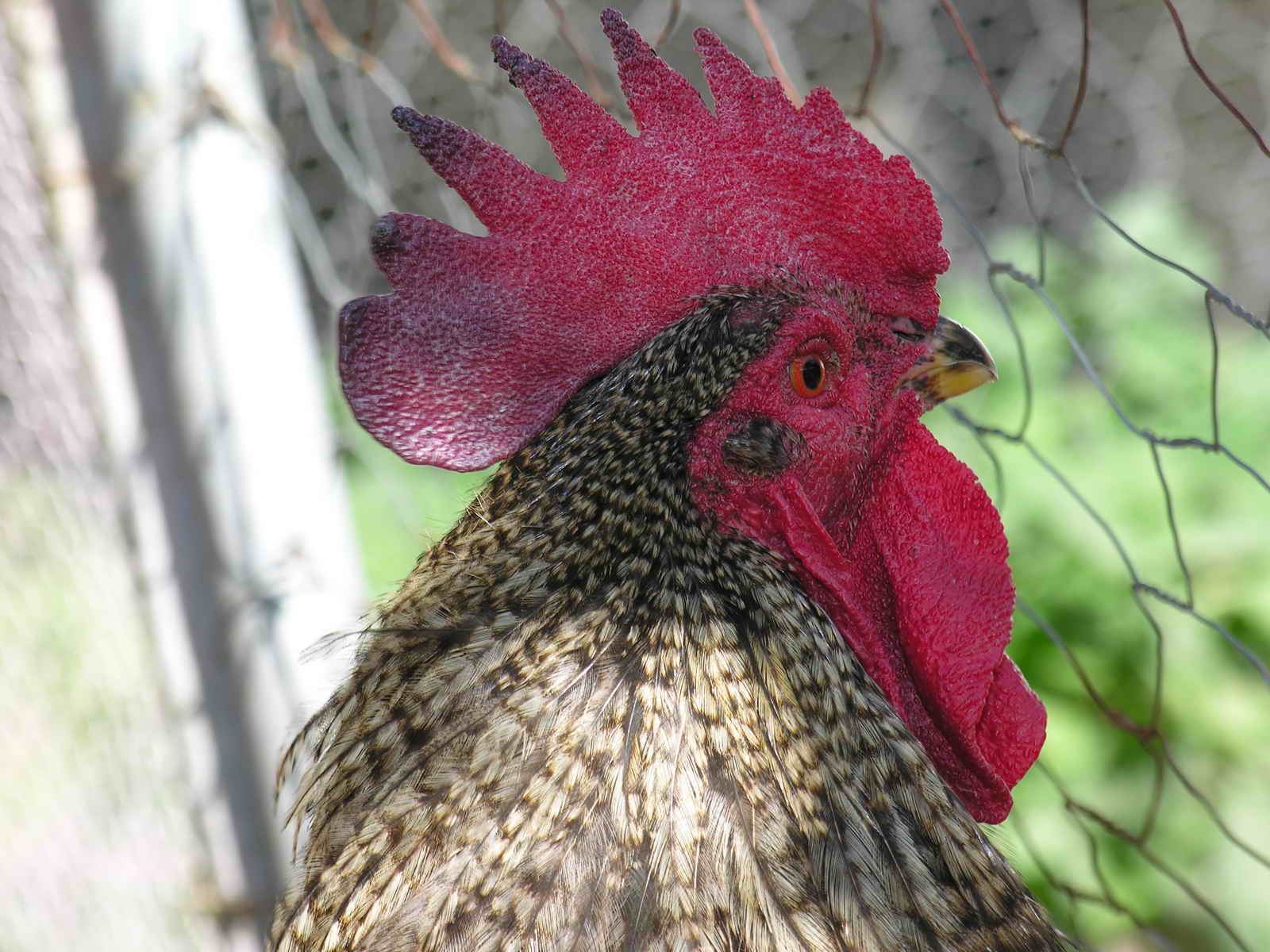 Teaño - Cuntis - Galicia - Spain